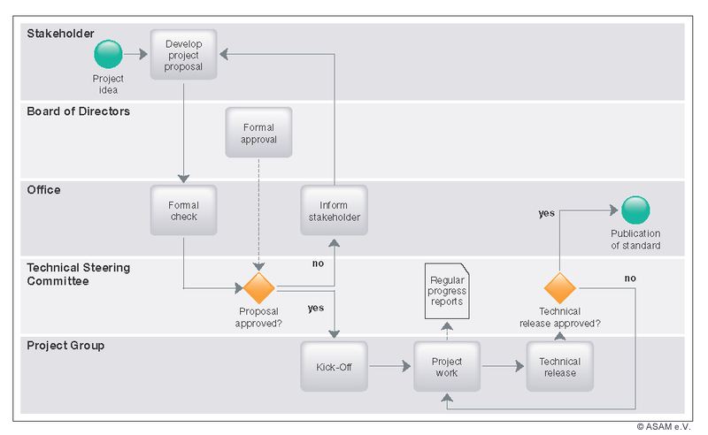 Life cycle of an ASAM standard